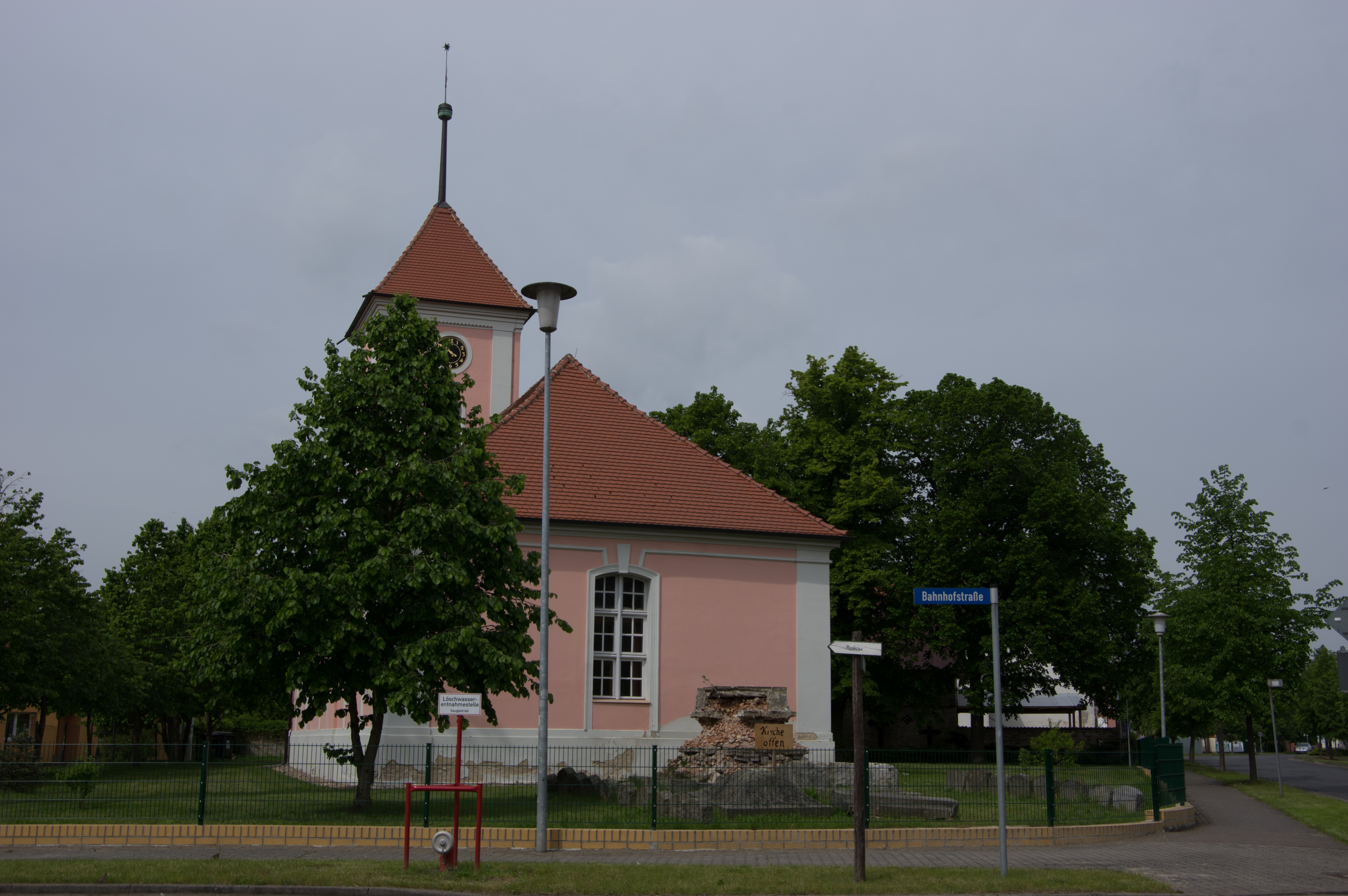 Roskow, Ortsteil Weseram in Brandenburg. Die Kirche steht unter Denkmalschutz.